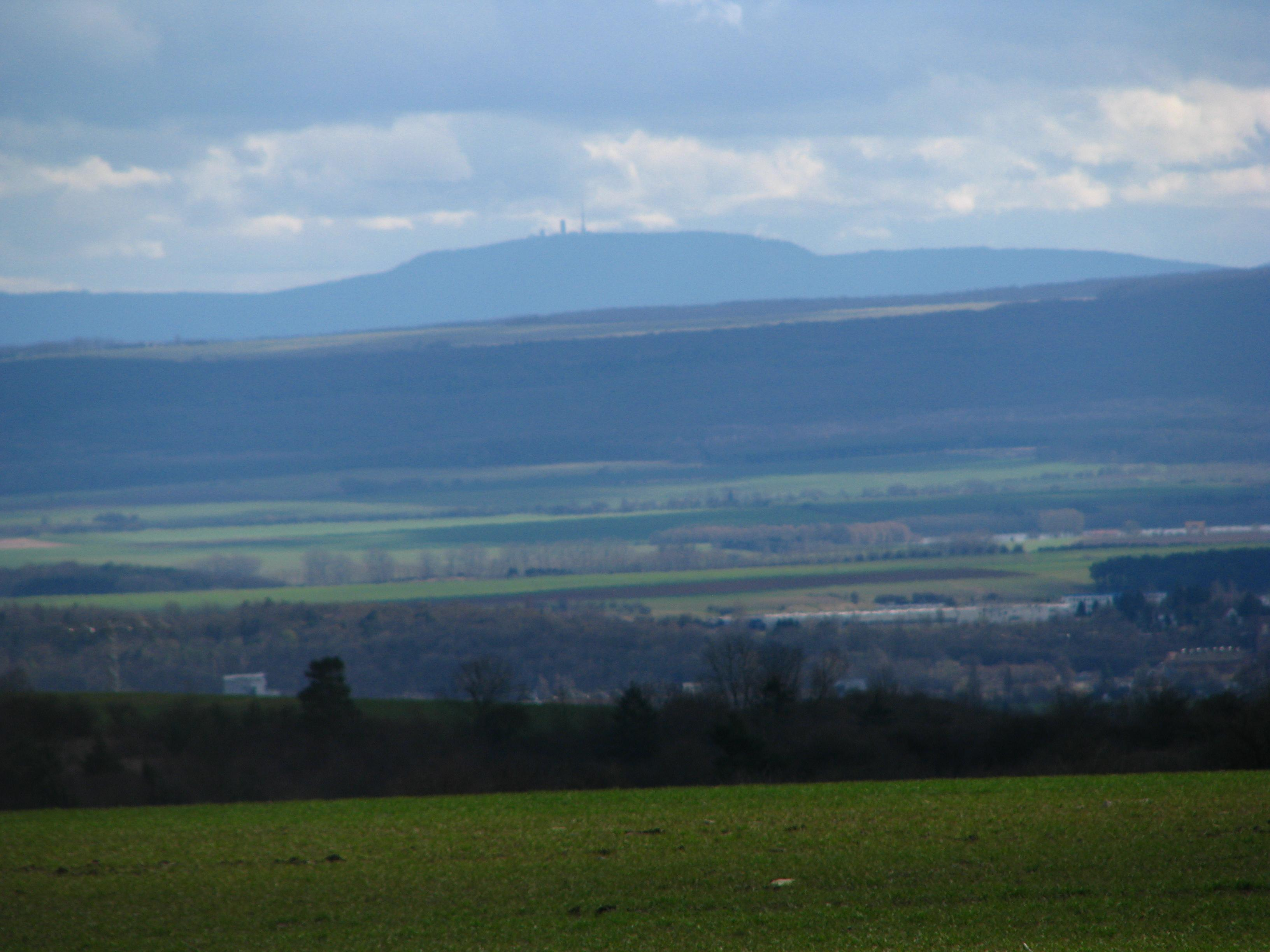 Blick zum Inselsberg vom östlichen Ortsrand von Kaisershagen. Der Berg liegt genau 44 km südlich des Ortes. Im Mittelgrund der südliche Hainich, im Vordergrund die Randbereiche von Mühlhausen (Thüringen).